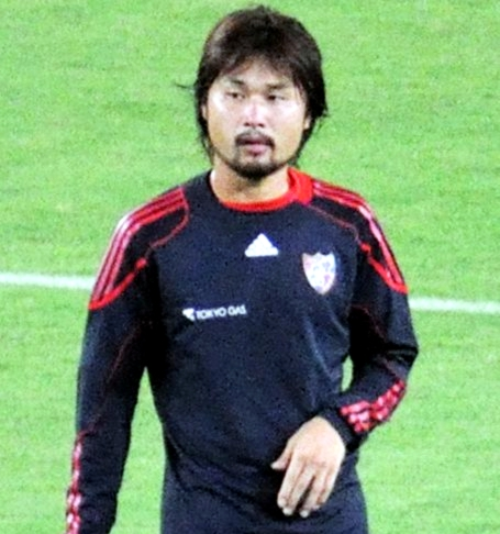 前田選手、プロフィール写真よりぽっちゃりしてなくてよかった。